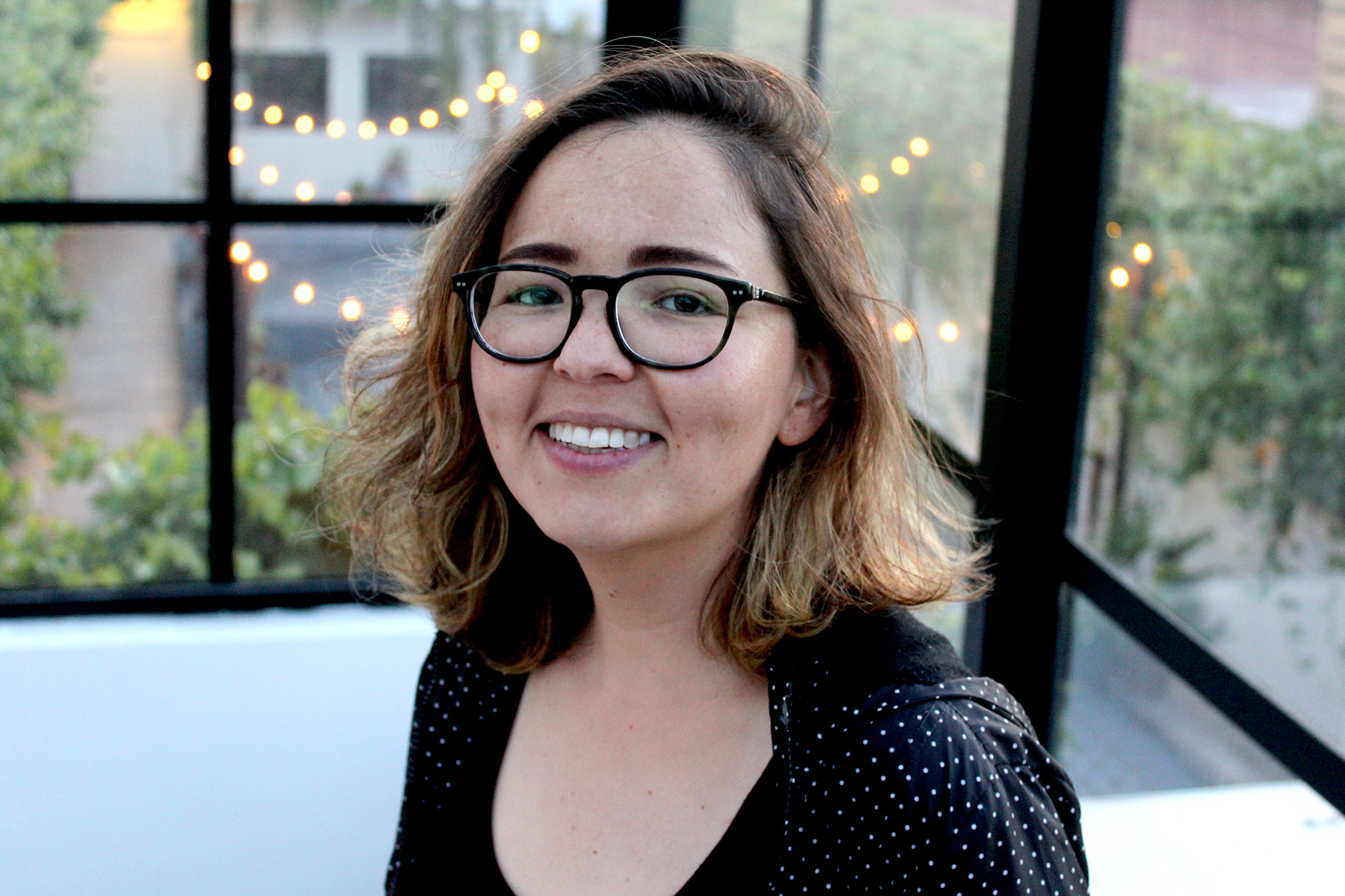 Ave Barrera (Guadalajara, México, 1980). Escritora Mexicana